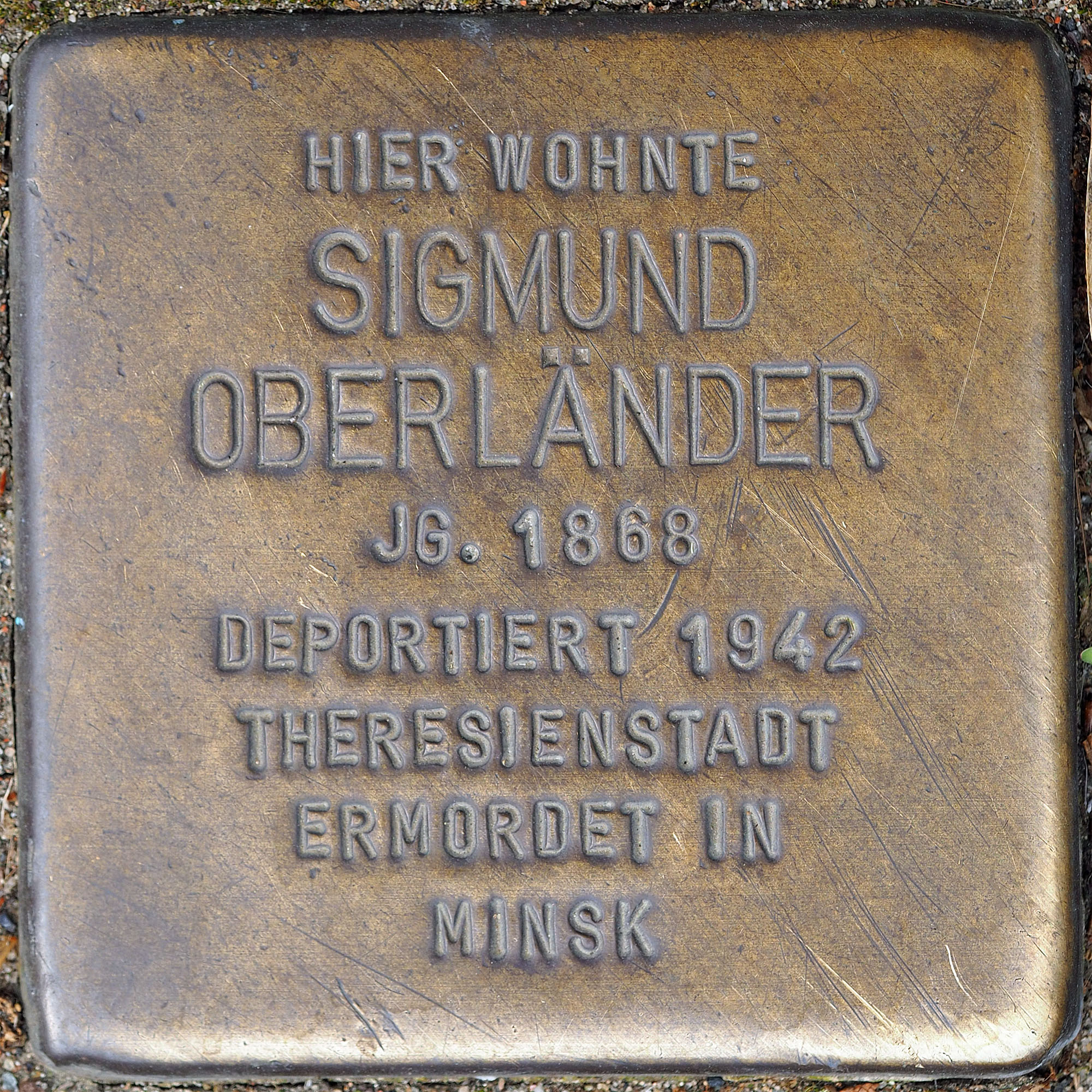 Stolpersteine MG: Oberländer, Sigmund